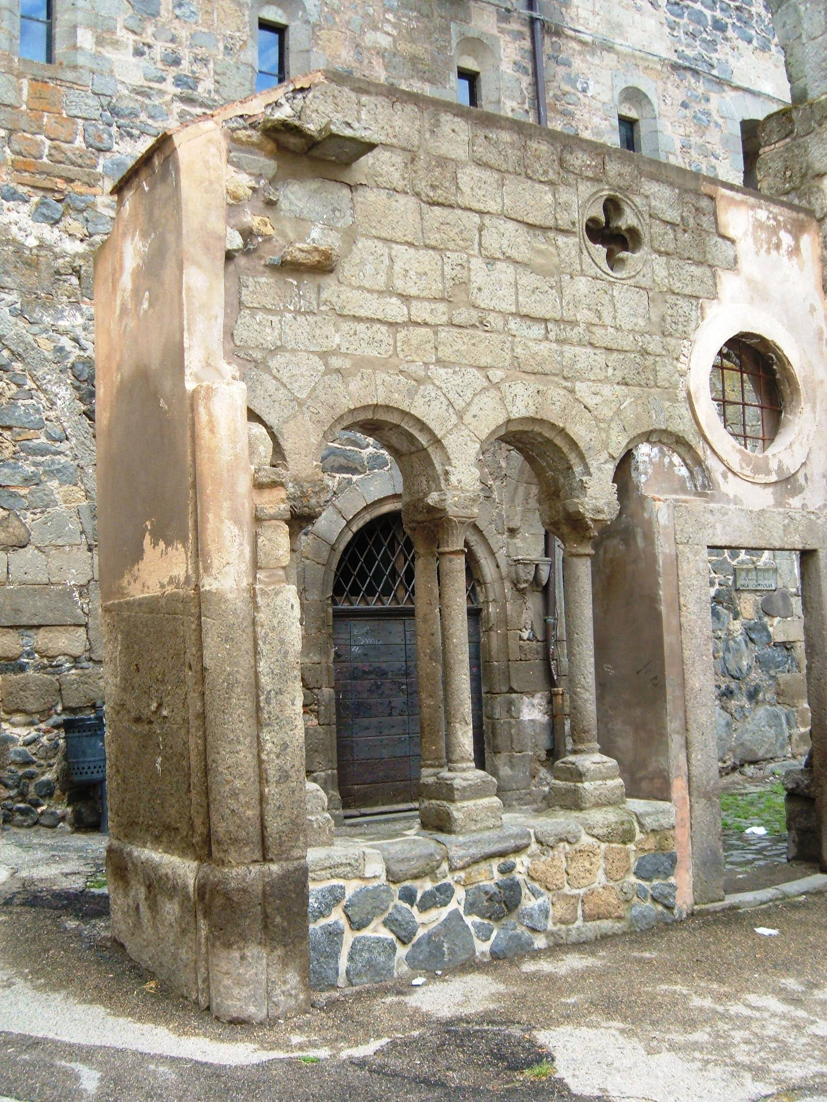 Resti del chiostro